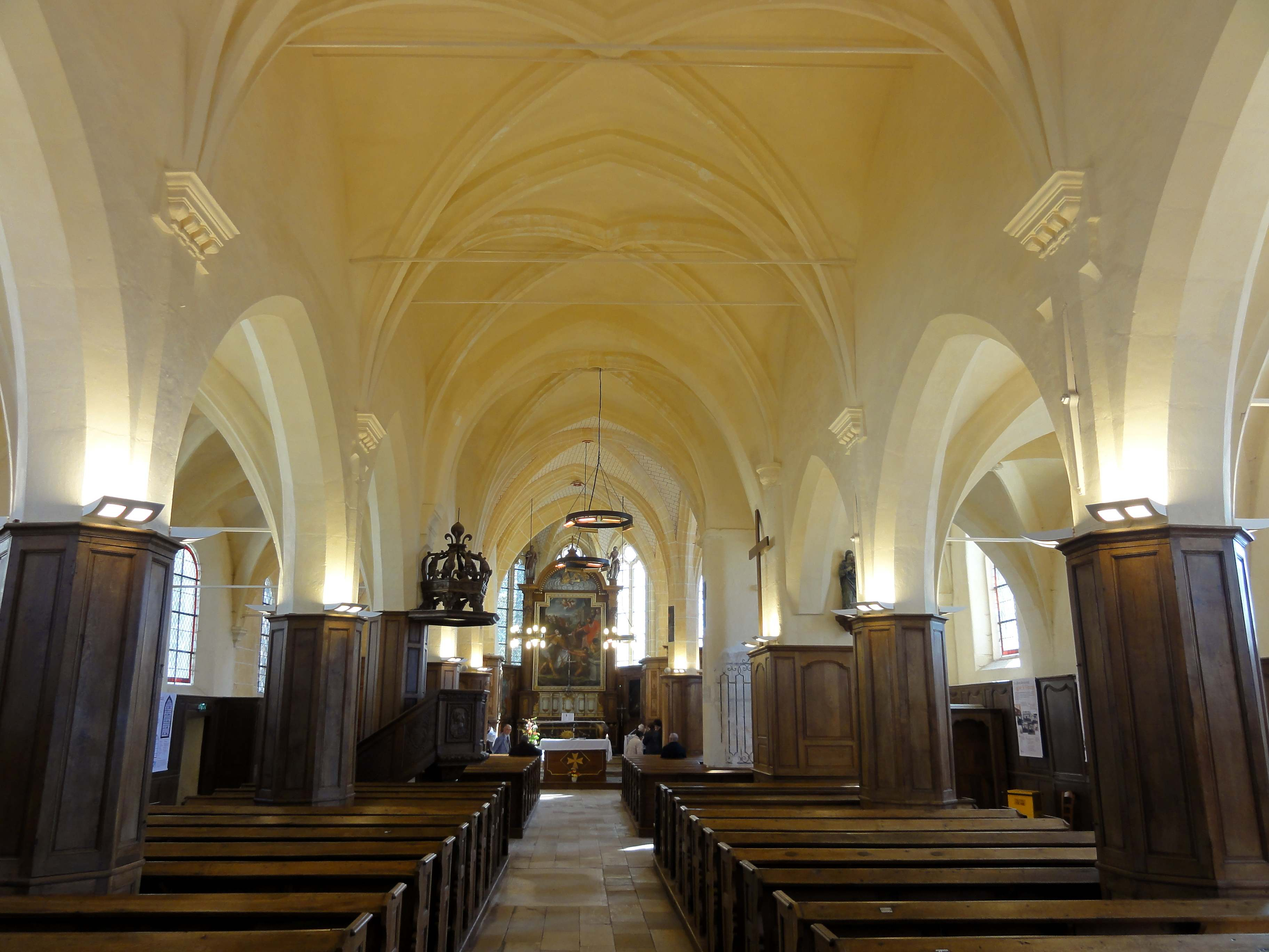 Interieur de l'église (voir titre).